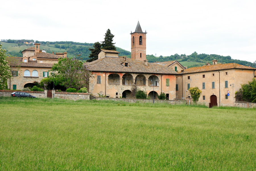 La frazione di Viazzano nel comune di Varano de' Melegari